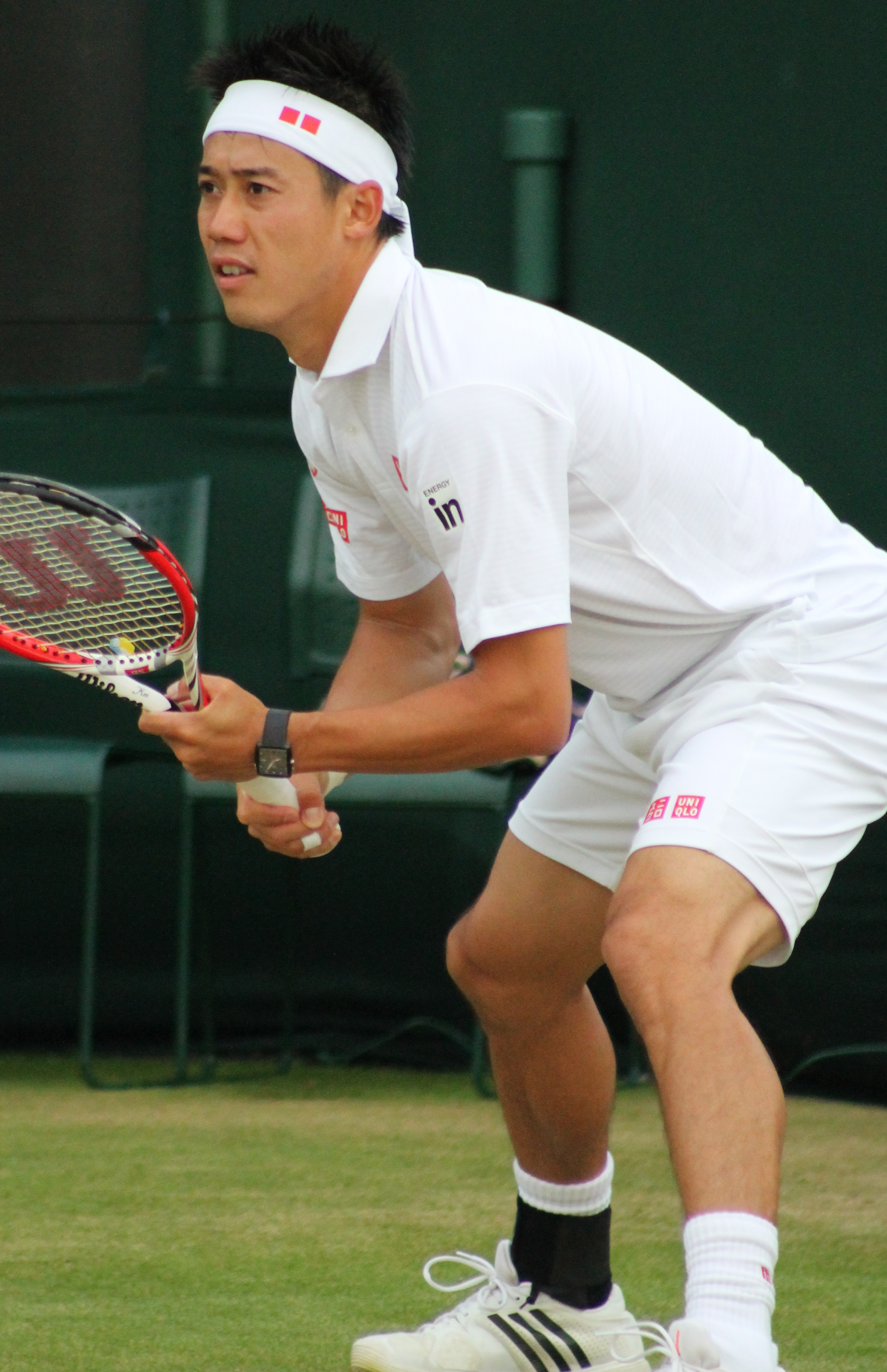 Nishikori WM14 (7)